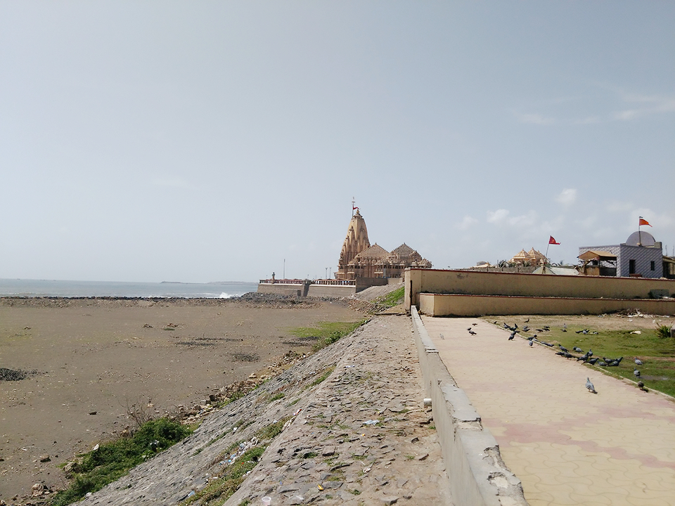 Somnath , Veraval , Gujarat,India